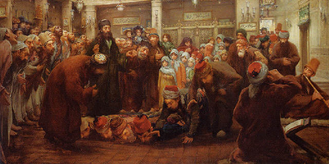 Cérémonie derviche.title QS:P1476,fr:"Cérémonie derviche." label QS:Lfr,"Cérémonie derviche."